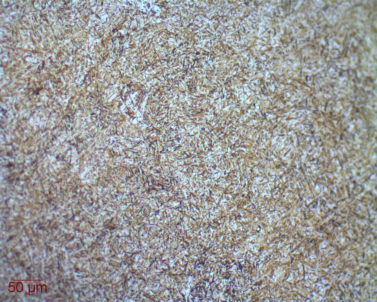 Martensite in SAE 1045 steel